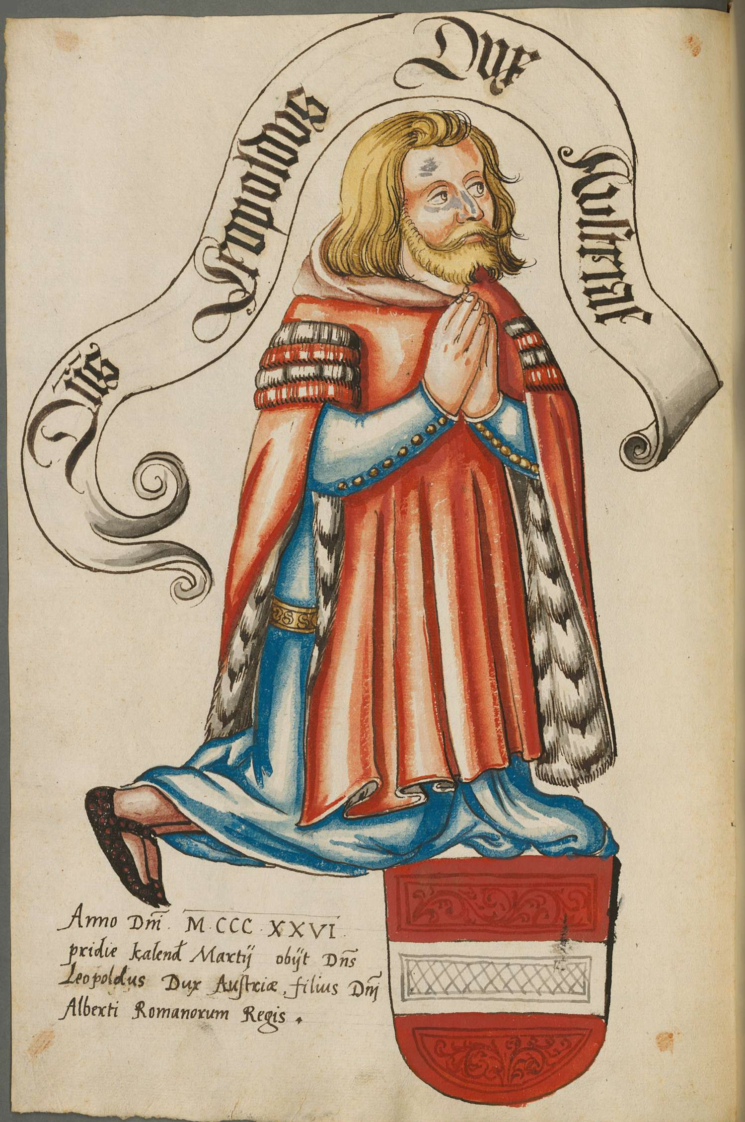 Fürstenbildnisse der Habsburger des 14. Jh. nach den Glasfenstern von Königsfelden/Aargau - BSB Cod.icon. 330 [S.l.] Nordschweiz (Bern ?) um 1560 fol. 16v: Leopold I., Herzog von Österreich und Steiermark